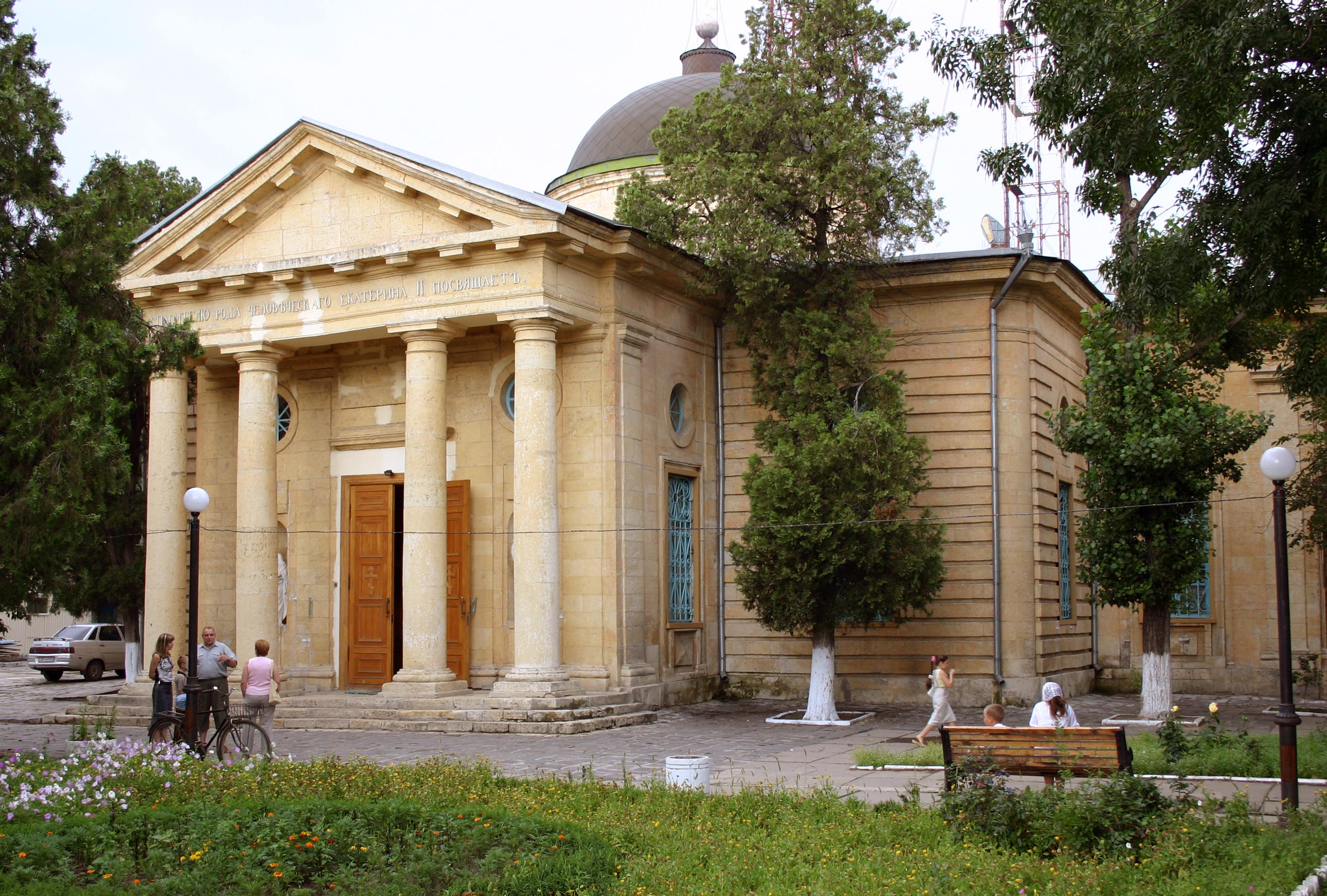 St. Ekaterinen-Kirche in Cherson, Grabstätte Grigori Alexandrowitsch Potjomkins